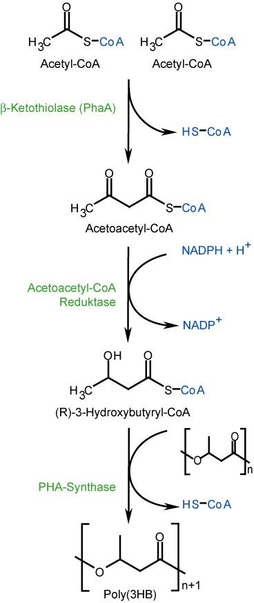 Biosyntheseweg von Polyhydroxybuttersäure (PHB)